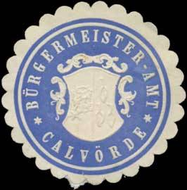 Siegelmarke des Bürgermeister-Amt von Calvörde um 1900